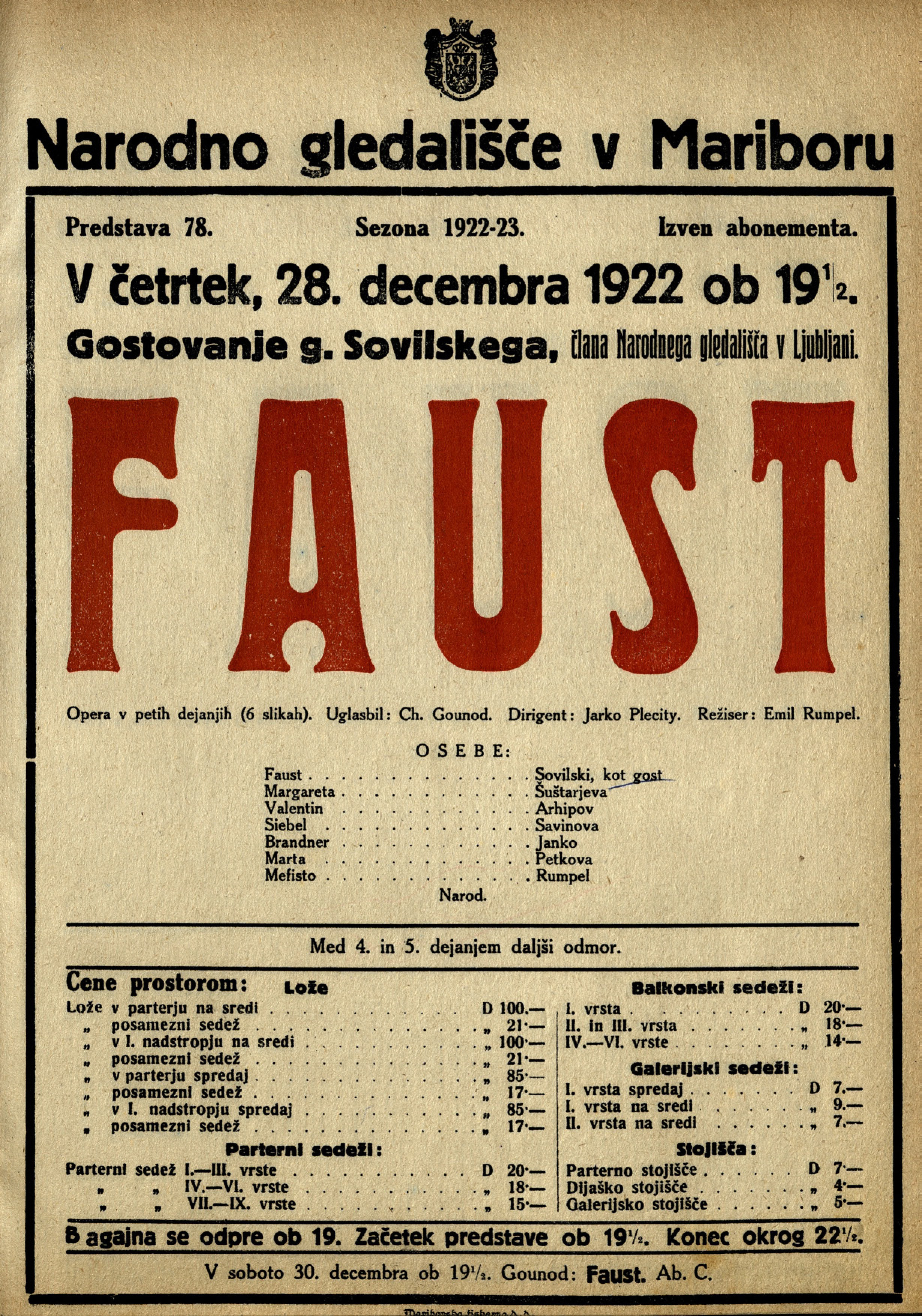 Plakat za predstavo Faust v Narodnem gledališču v Mariboru.